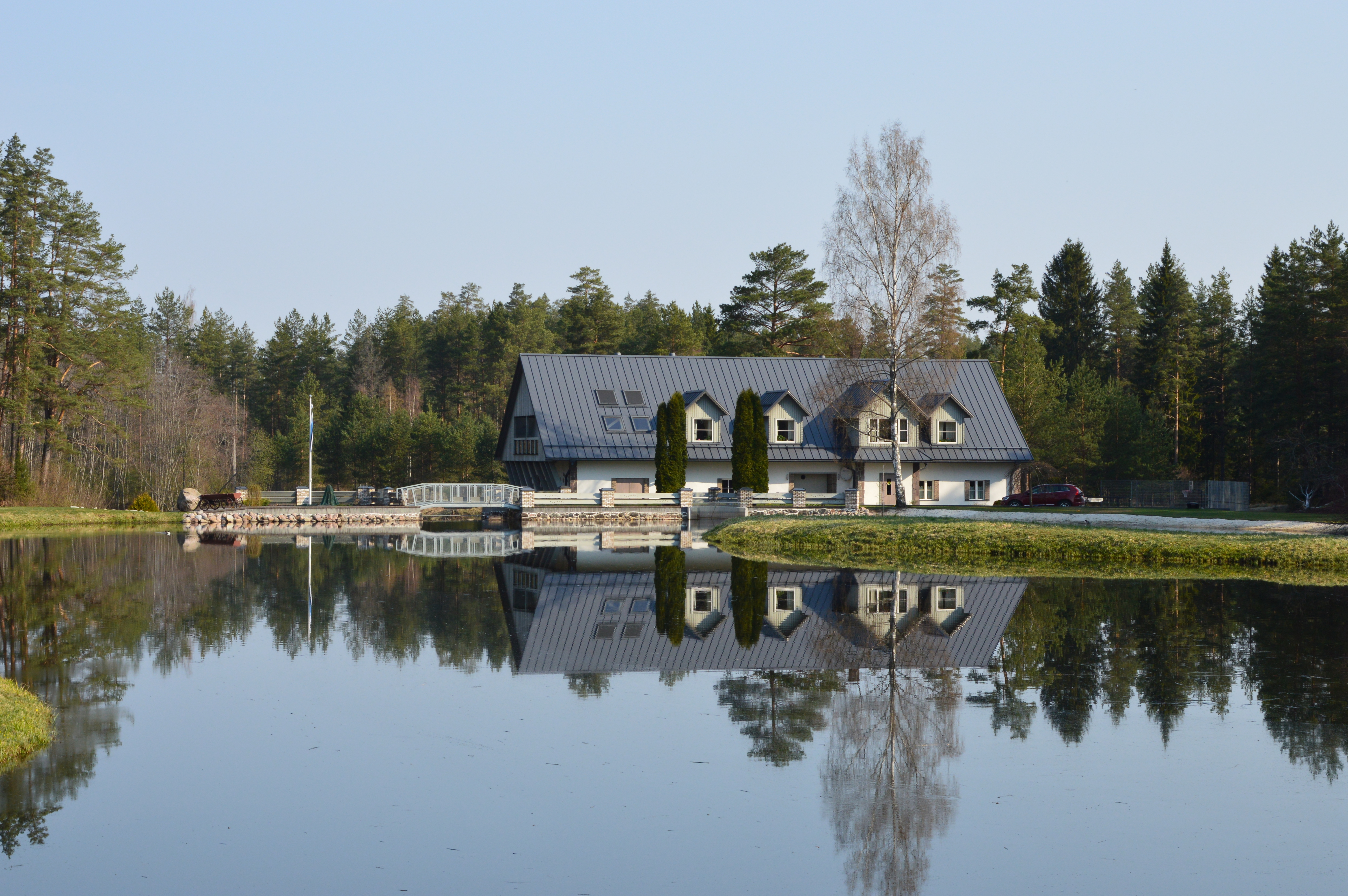 Kaku vesiveski